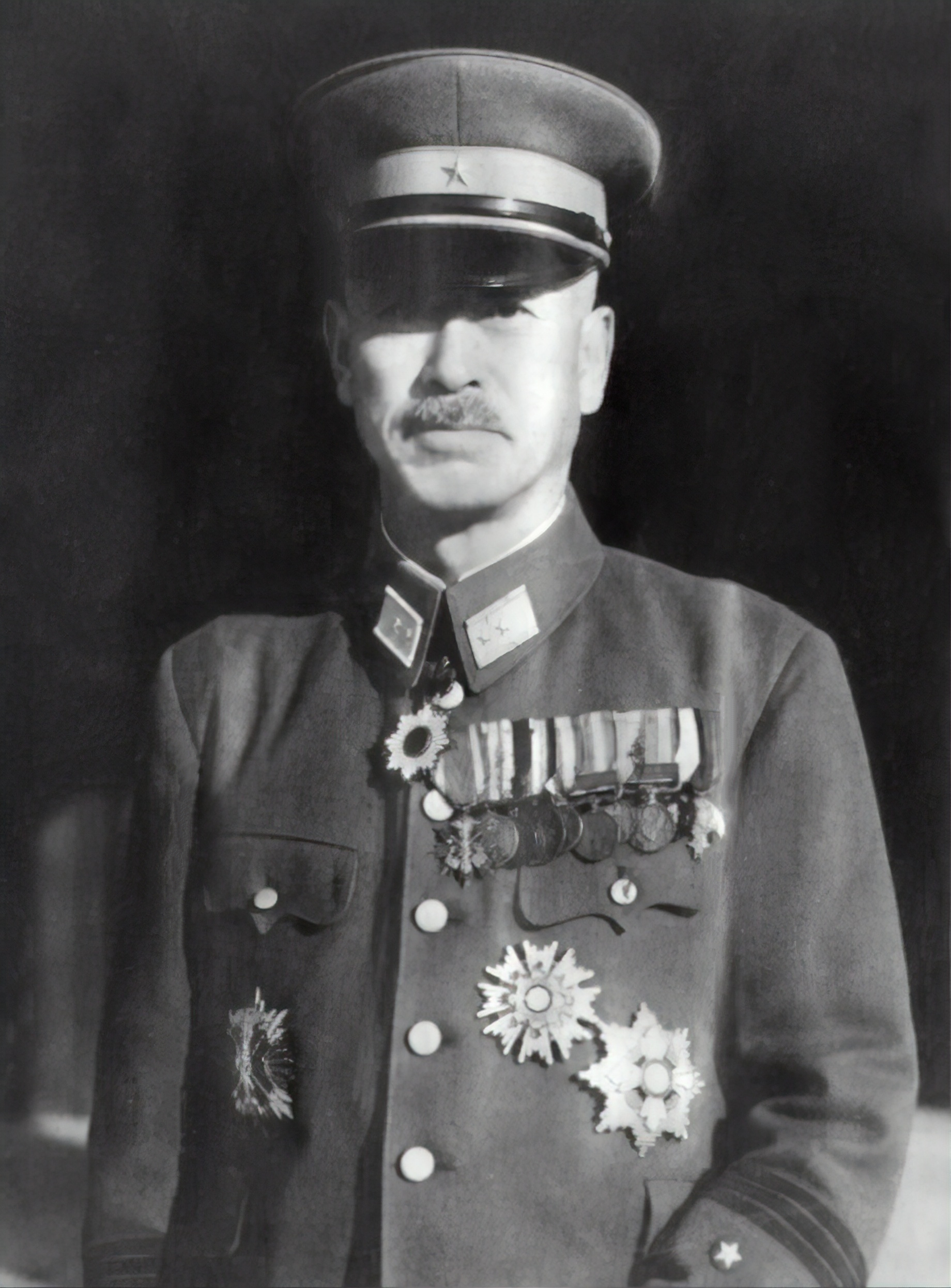 Mitsuru Ushijima (July 31, 1887 – June 22, 1945)